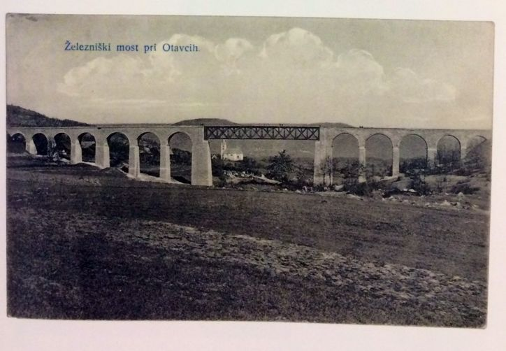 Viadukt pri Otovcu, že dograjen.